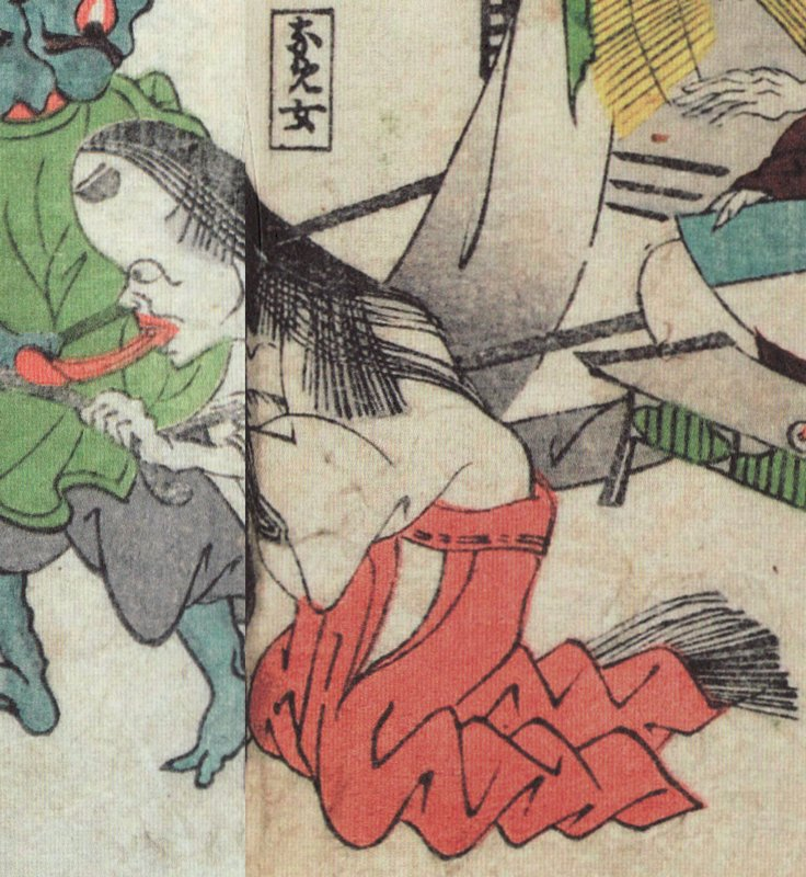 Nameonna 舐め女 from Kyōka hyakki yakyō (狂歌百鬼夜興)